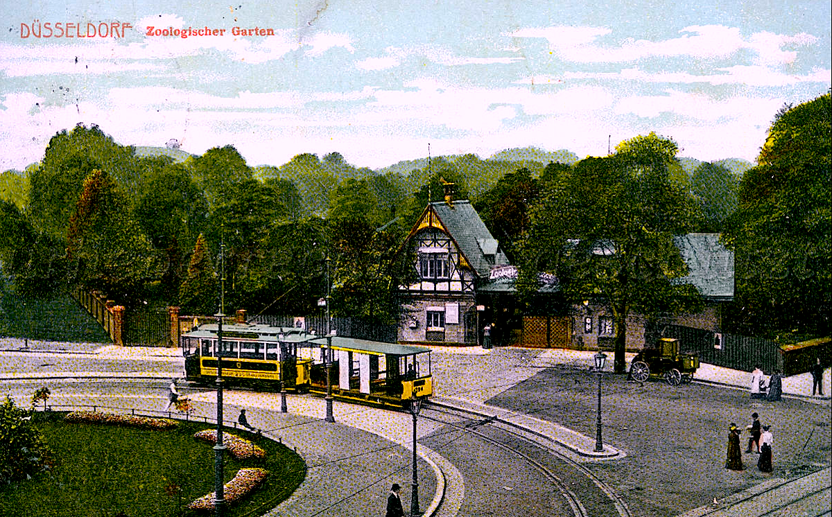 Площадь Брема, Дюссельдорф, 1909 год.